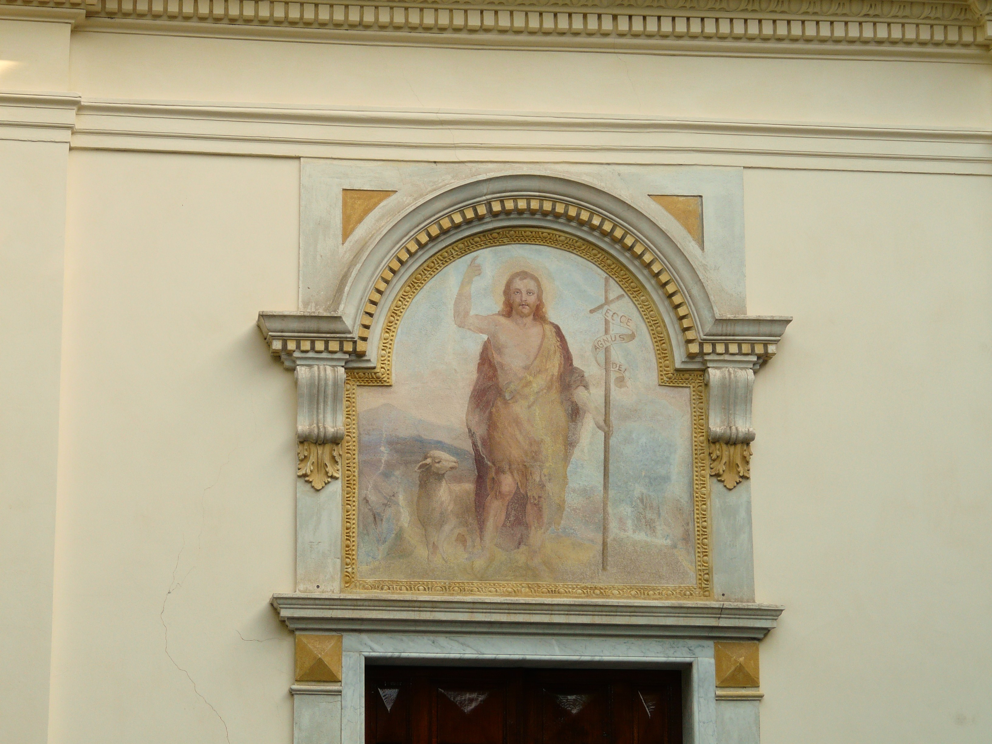 Chiesa di San Giovanni Battista, Semorile di Zoagli, Liguria, Italia